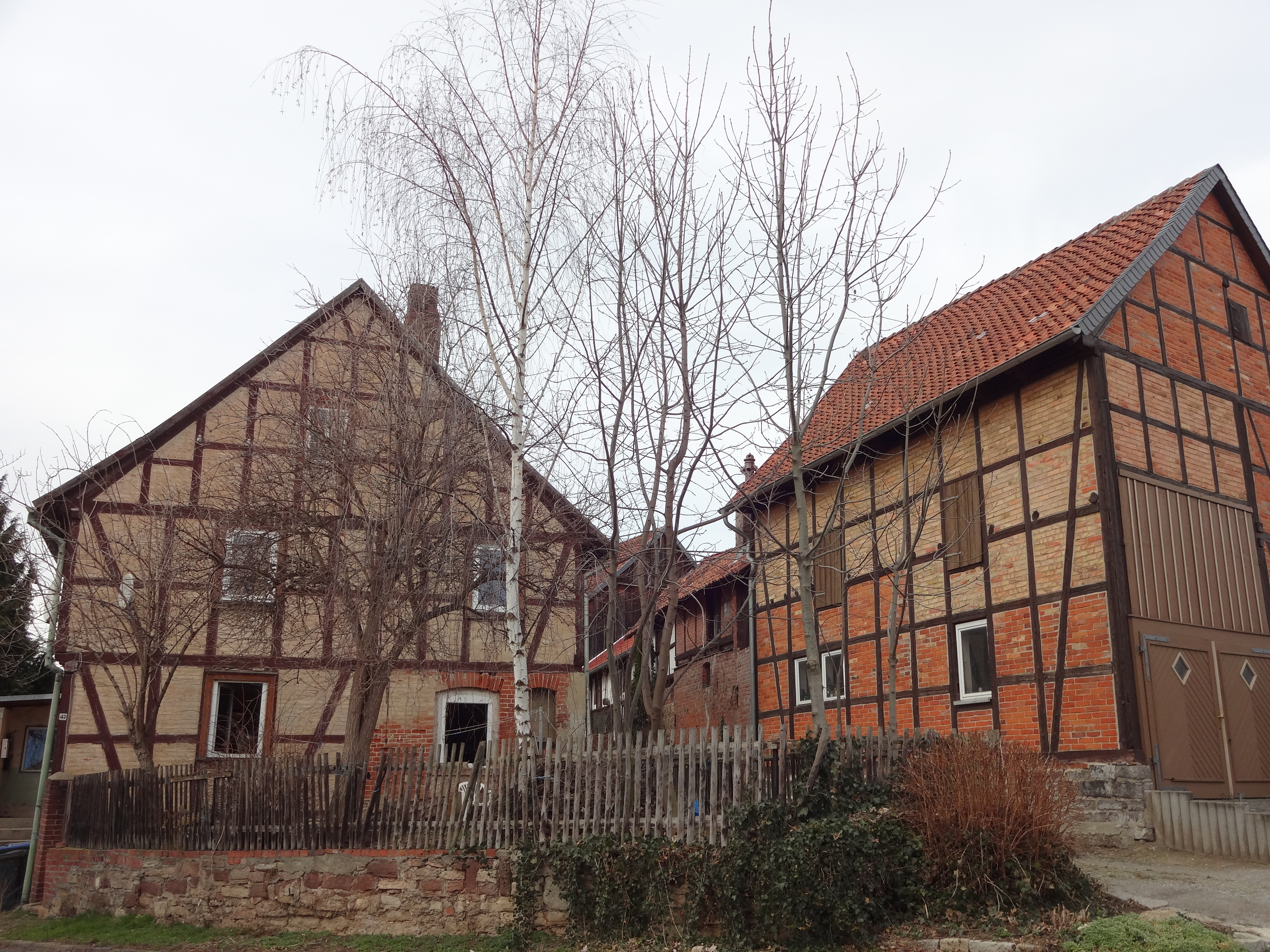 denkmalgeschütztes Bauernhaus in der Hauptstraße 47 sowie Hauptstraße 46 in Minsleben, Ortsteil von Wernigerode